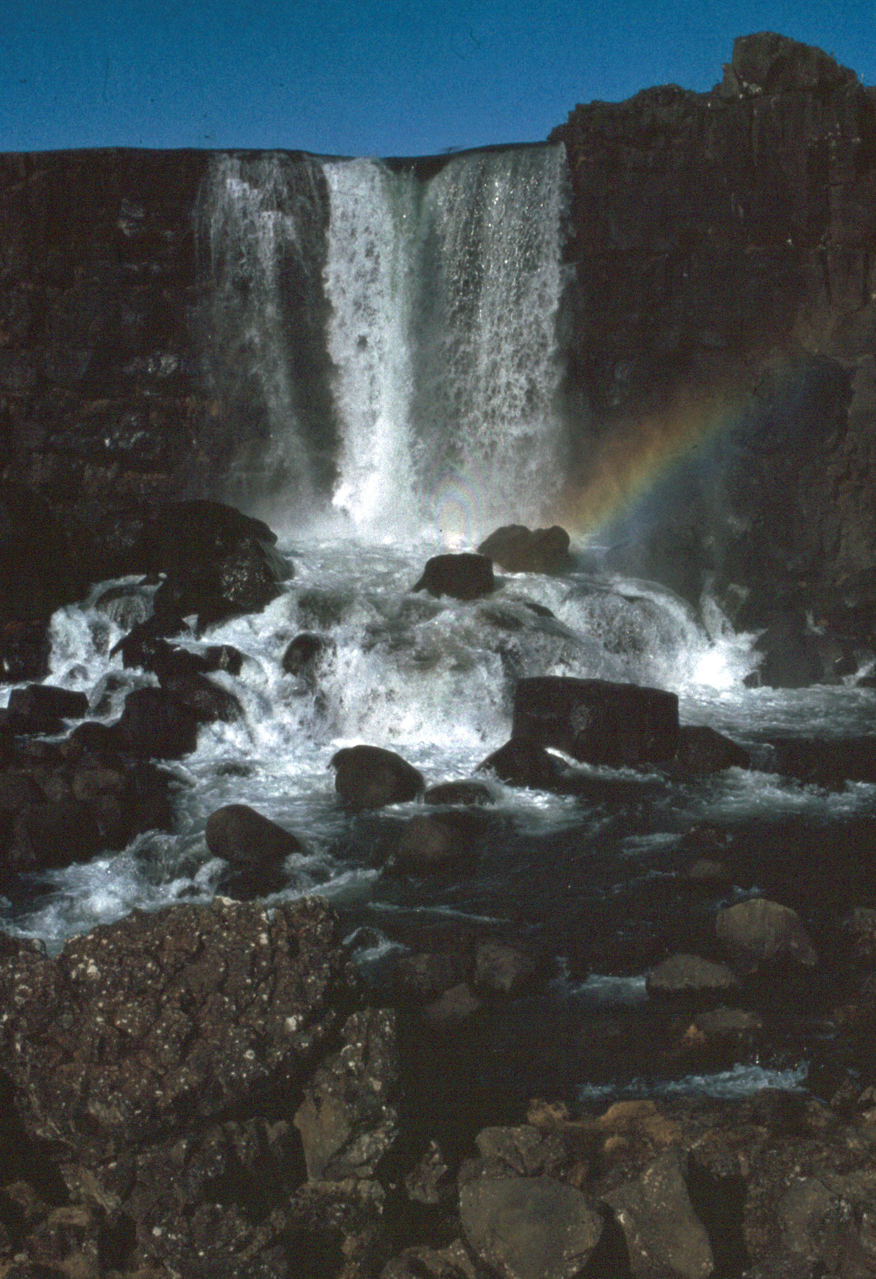 Thingvellir